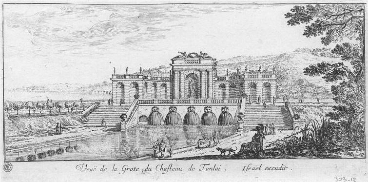 Veuë de la Grote du Chasteau de Tanlai